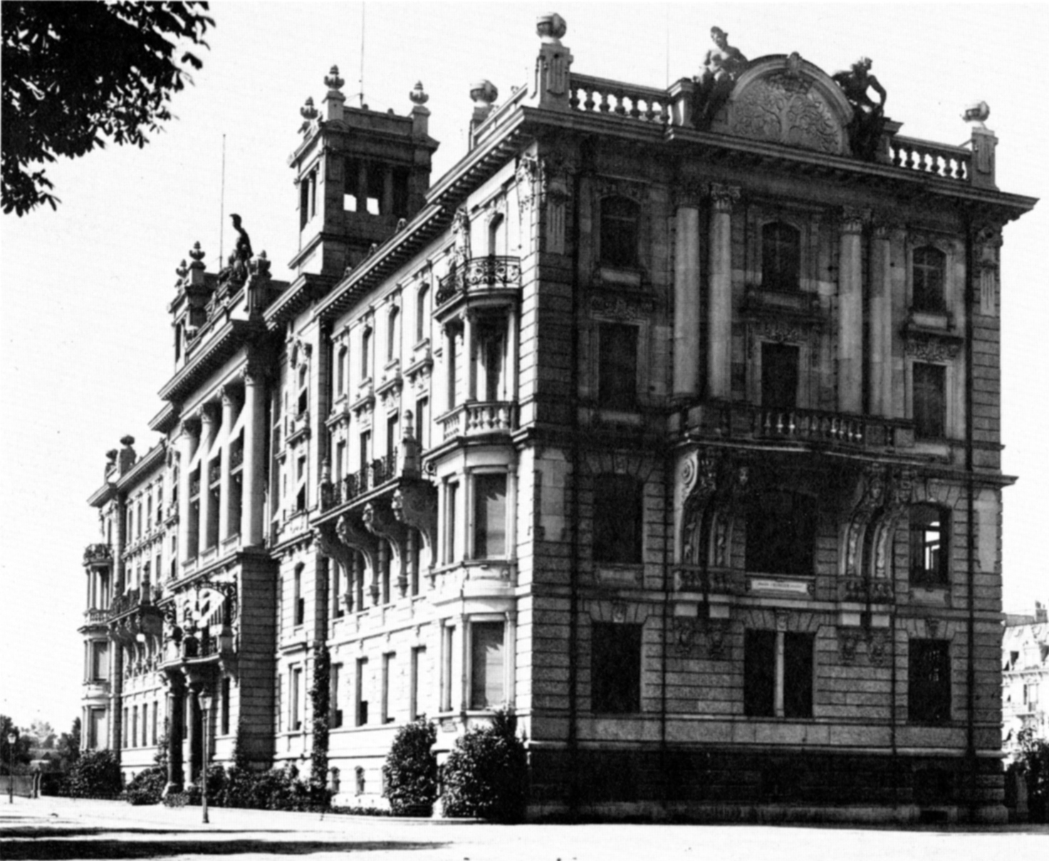 Das Geschäftshaus der "Zürich" Unfallversicherungsgesellschaft in Zürich 1905. Architekt Julius Kunkler.